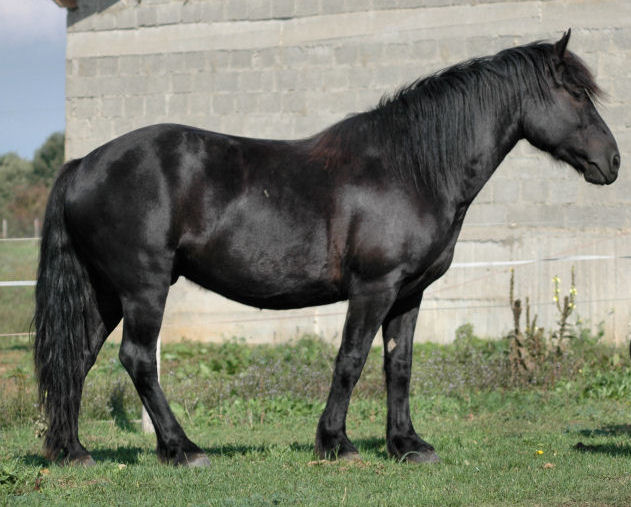 Nickel de Vives, Rasse, Race: Merens